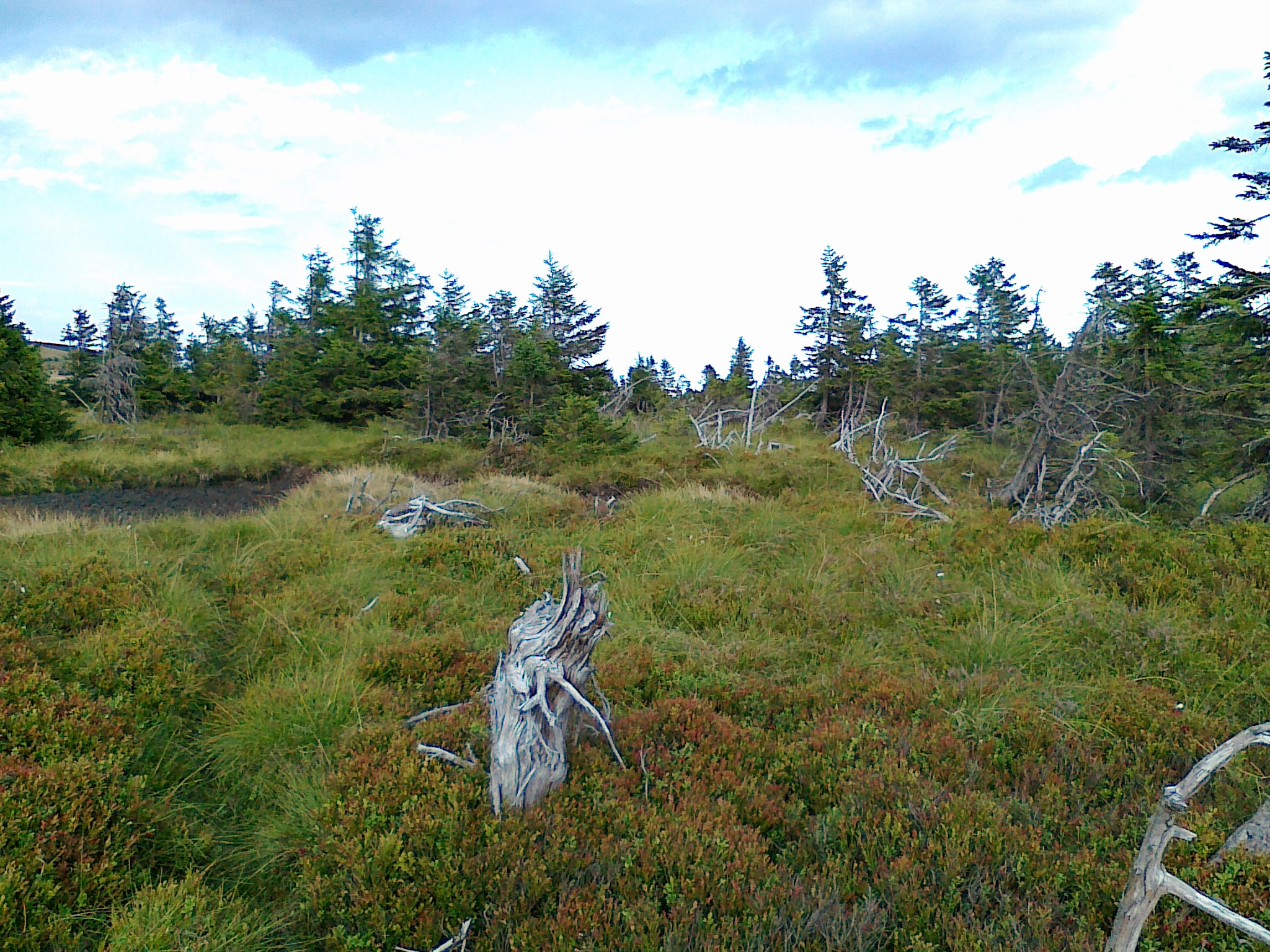 Szczyt góry Velký Máj - 1386 m n.p.m.